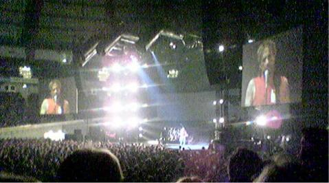 Zweites Konzert der Böhsen Onkelz in Dortmund der 2004er Tour, 2004-10-03. Urheber: Christoph Osterkamp